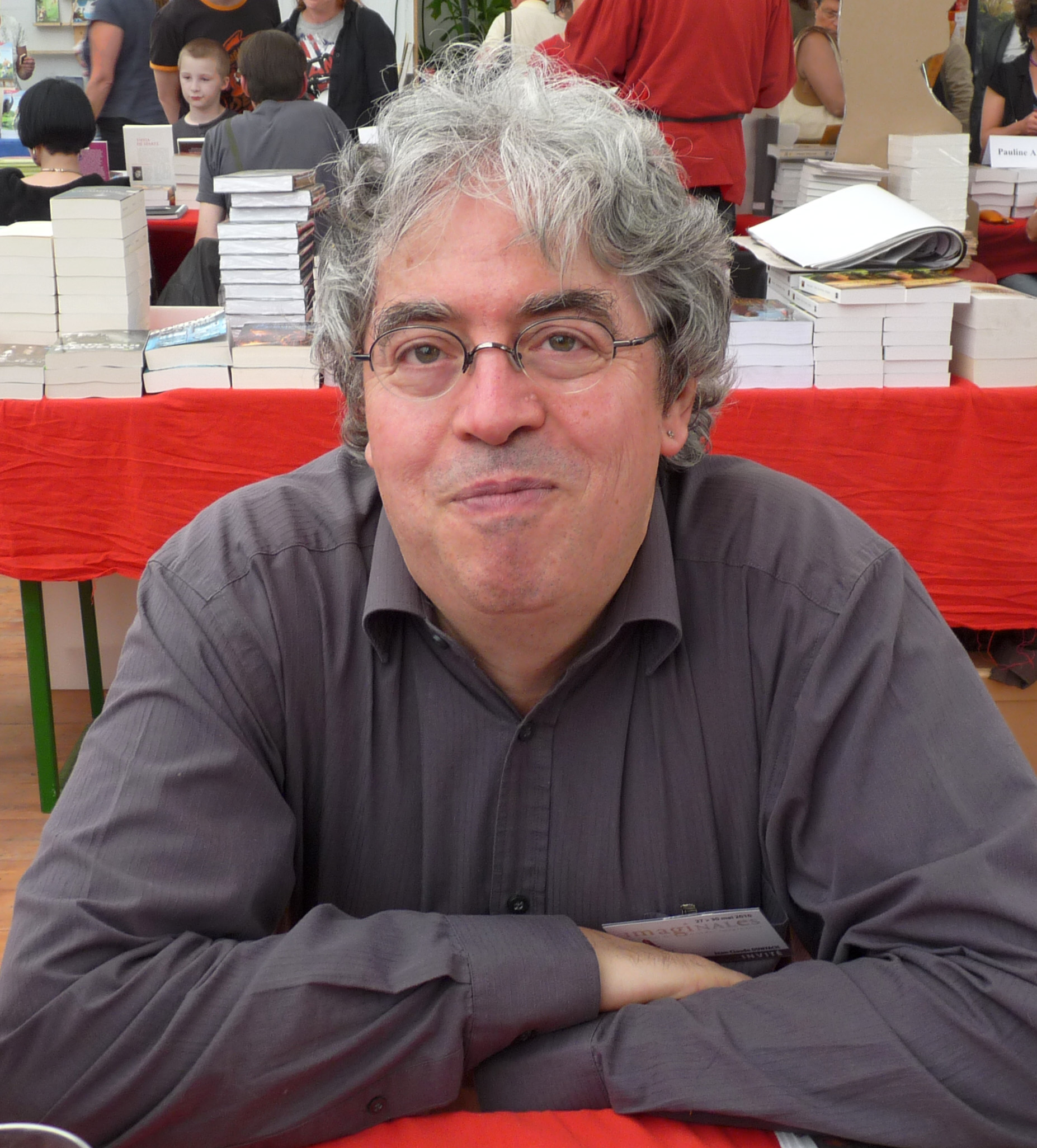 L'écrivain français Jean-Claude Dunyach (Imaginales 2010, Epinal, France)